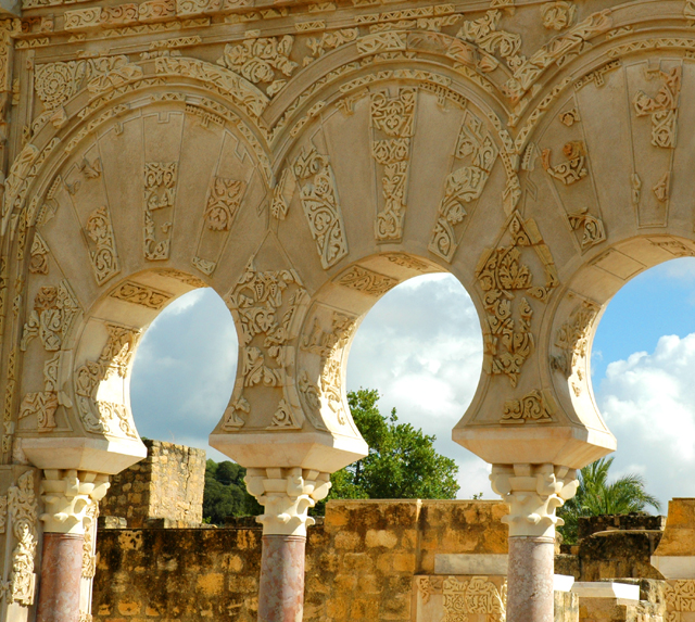 Puerta del Primer Ministro en Medina Azahara, Córdoba (España).